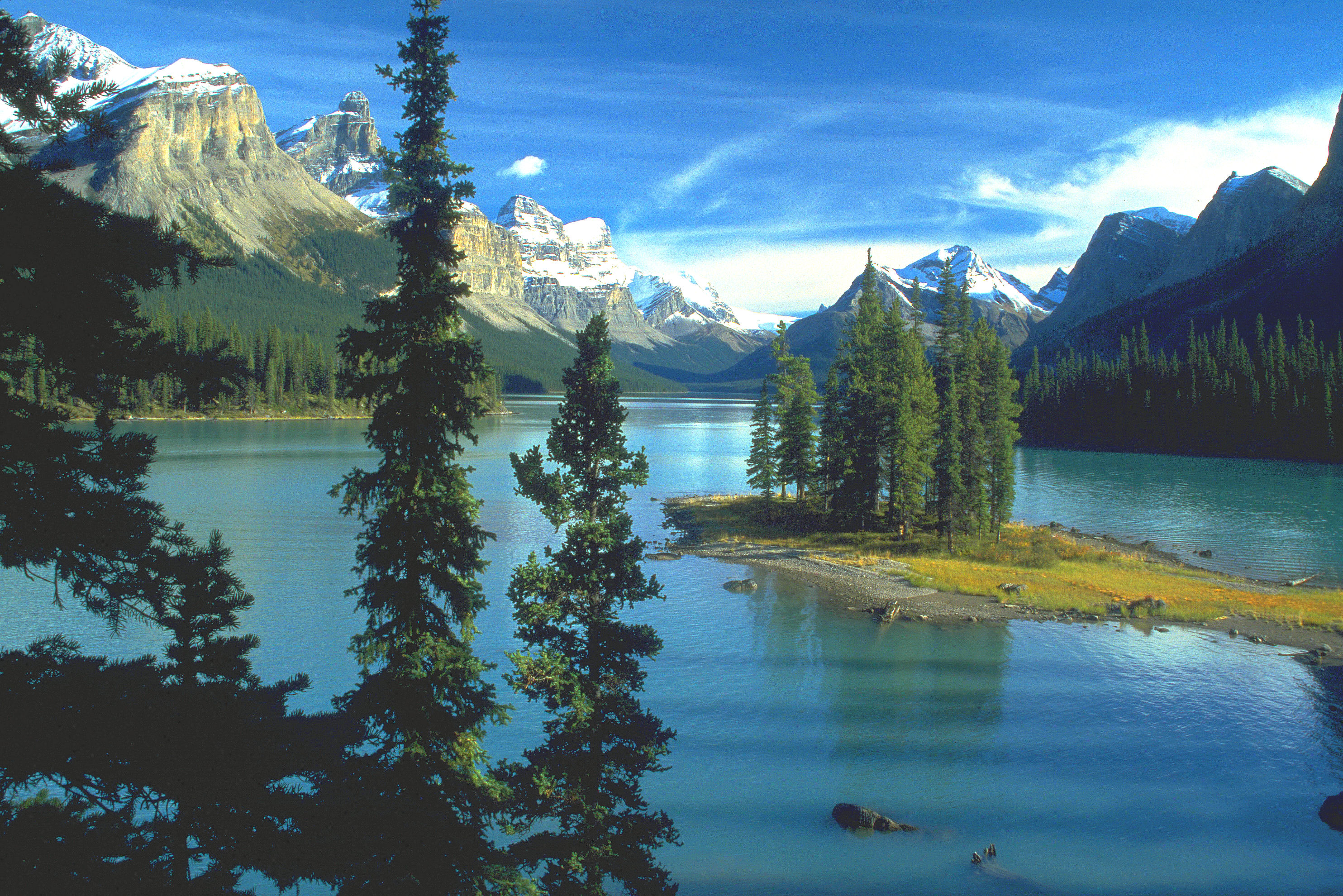 Spirit Island, Maligne Lake, Jasper NP Fotografiert mit Canon EOS 5 u. Canon-Objektiv 28-80mm (28mm Stellung). Digitalisiert von Kodak-Lab.auf Kodak Pic-CD, EBV mit PSP 5.